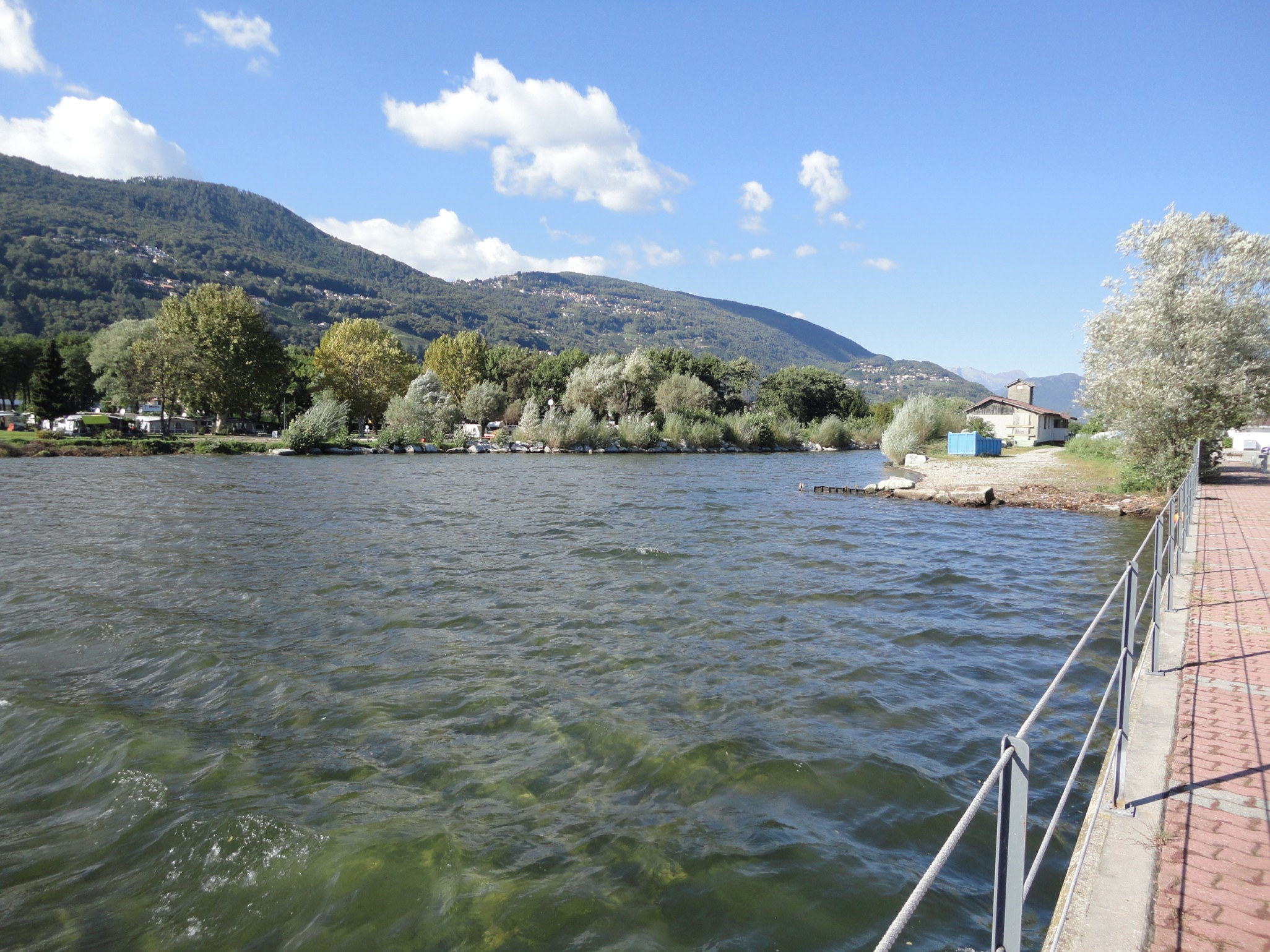 Foci del fiume Vedeggio viste dal porticciolo di Muzzano